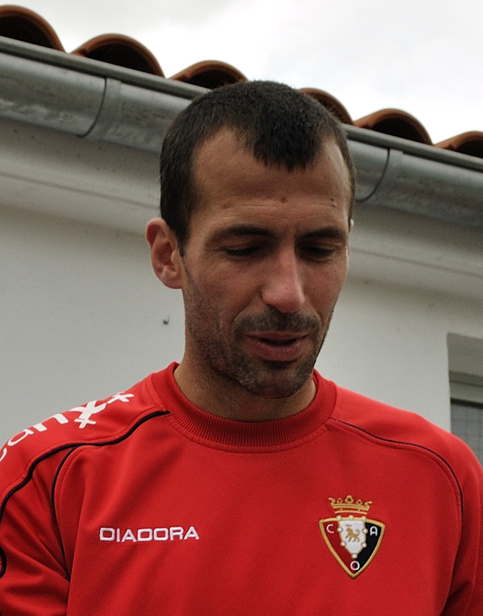 El jugador de fútbol Patxi Puñal